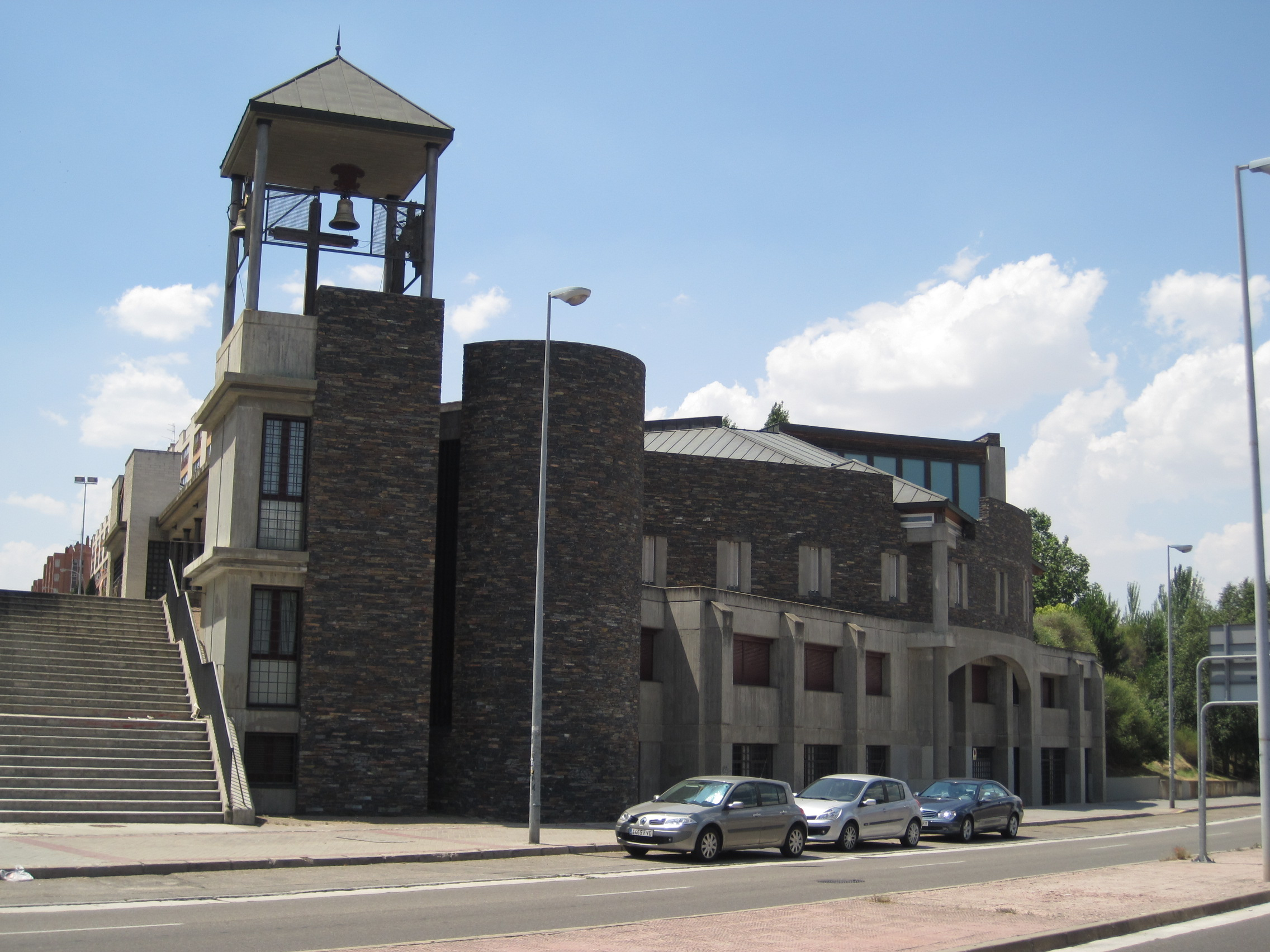 Iglesia de Nuestra Señora de Prado, en el barrio de Parquesol, Valladolid (España).